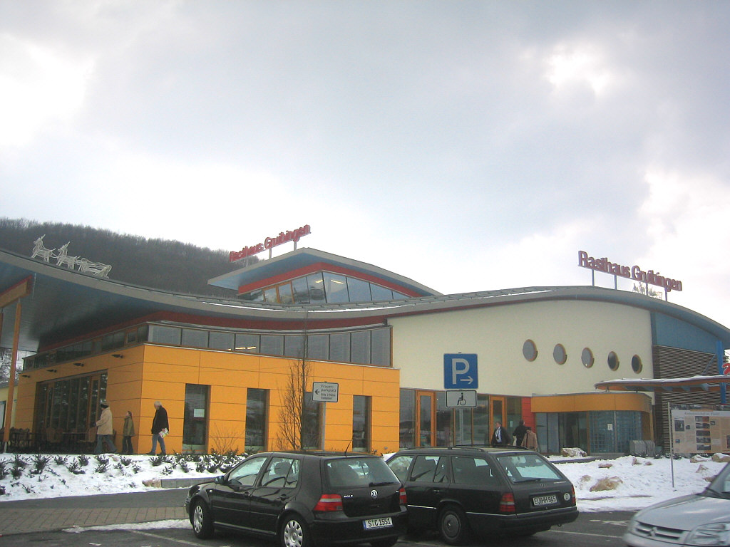 Gruibingen, Feng-Shui-Rasthaus an der Autobahn A8